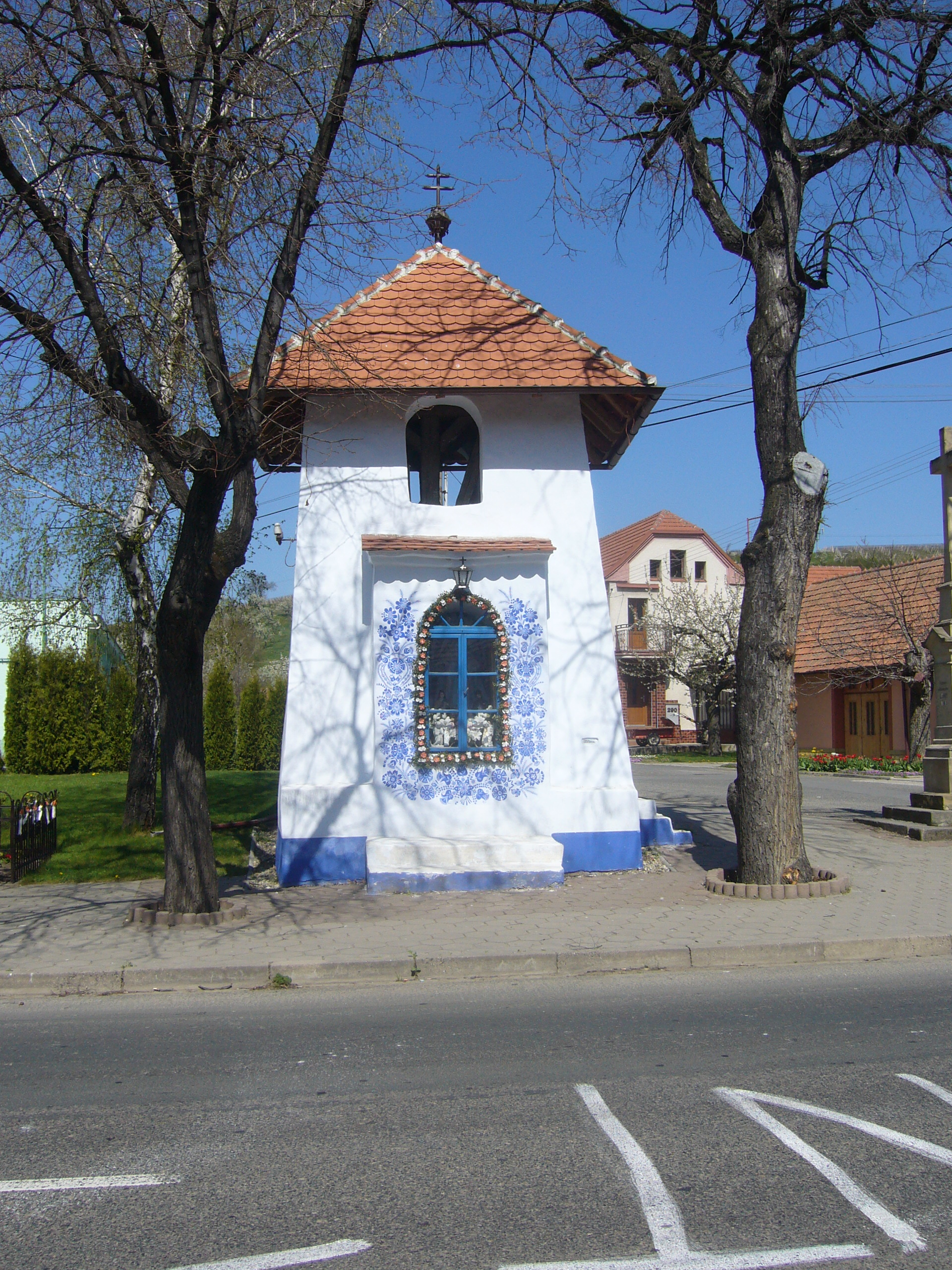 Historická kaplička-zvonice v obci, která stojí vedle nového kostela a památníku obětem I. světové války. Kaplička pochází asi z počátku 18. století a je zdobena místními ornamenty, které se každý rok obnovují.